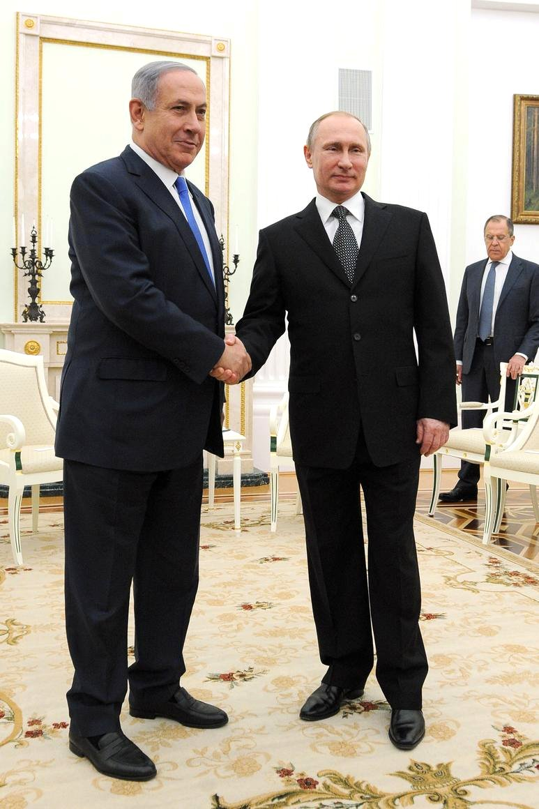 Президент России Владимир Путин с премьер-министром Израиля Биньямином Нетаньяху